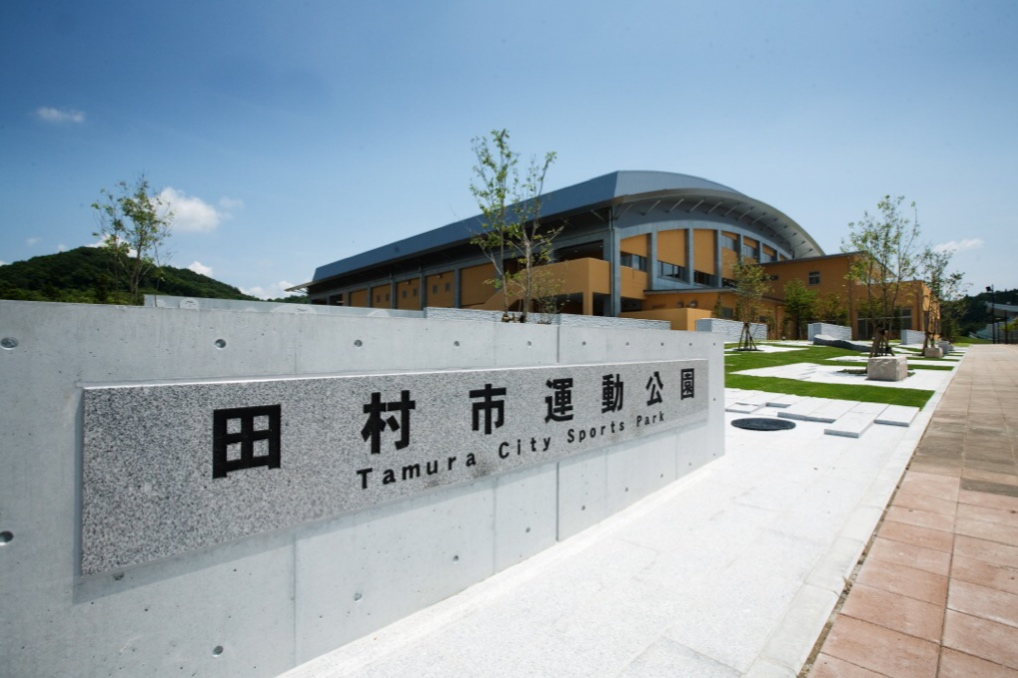 田村市運動公園。